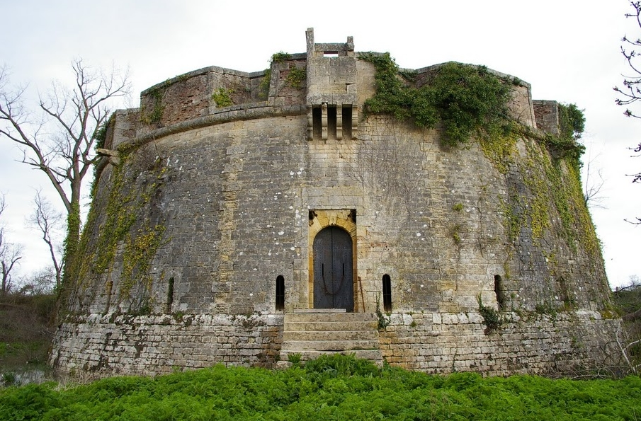 Fort Paté, (Inscrit, 1935) .